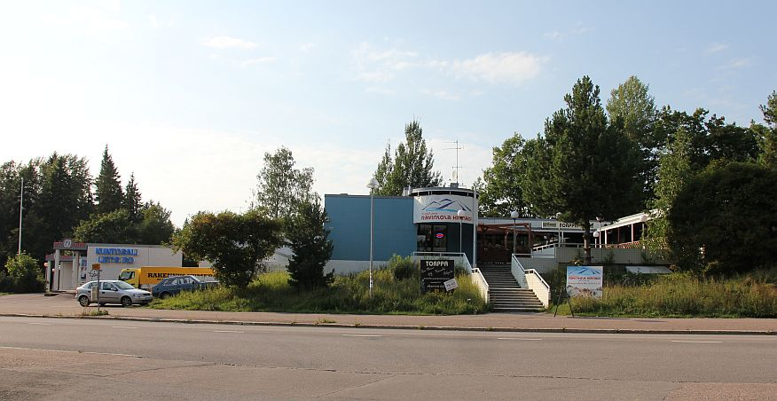 Kuntosali ja ravintola Torppa. Nuijatie 2, Rajatorpan asuinalue, Vapaala, Vantaa. Huom: Muista säilyttää viittaus kuvaajaan, mikäli käytät kuvaa.